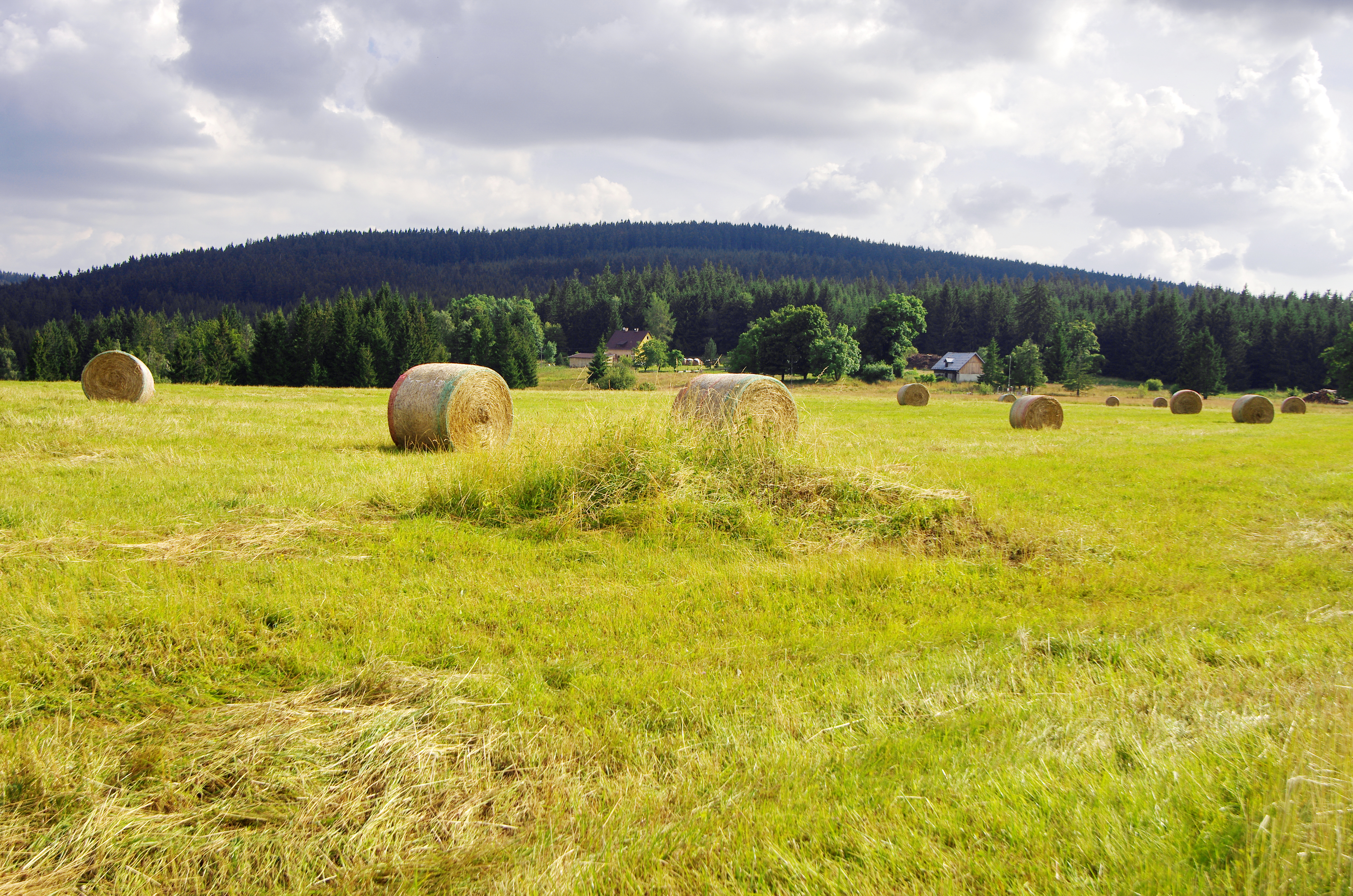 Vrch Lesný, nejvyšší hora Slavkovského lesa, pohled od Horních Lazů, okres Cheb